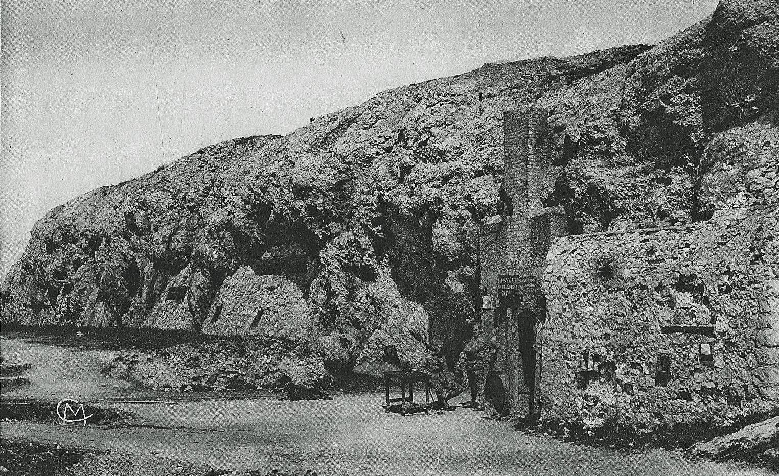 Le Fort_de_Vaux, les_8_et 9_juin_1916.